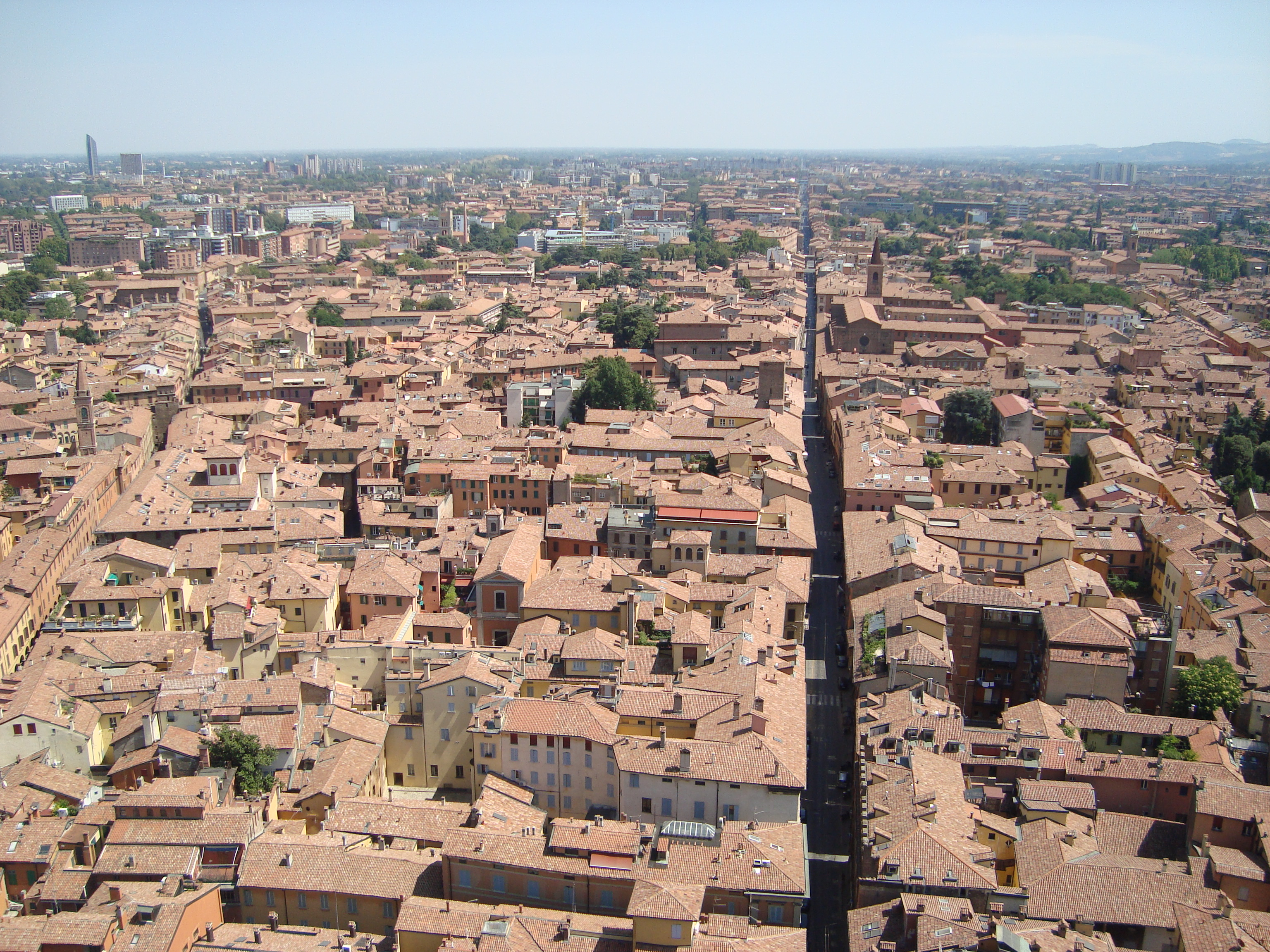 Bologna